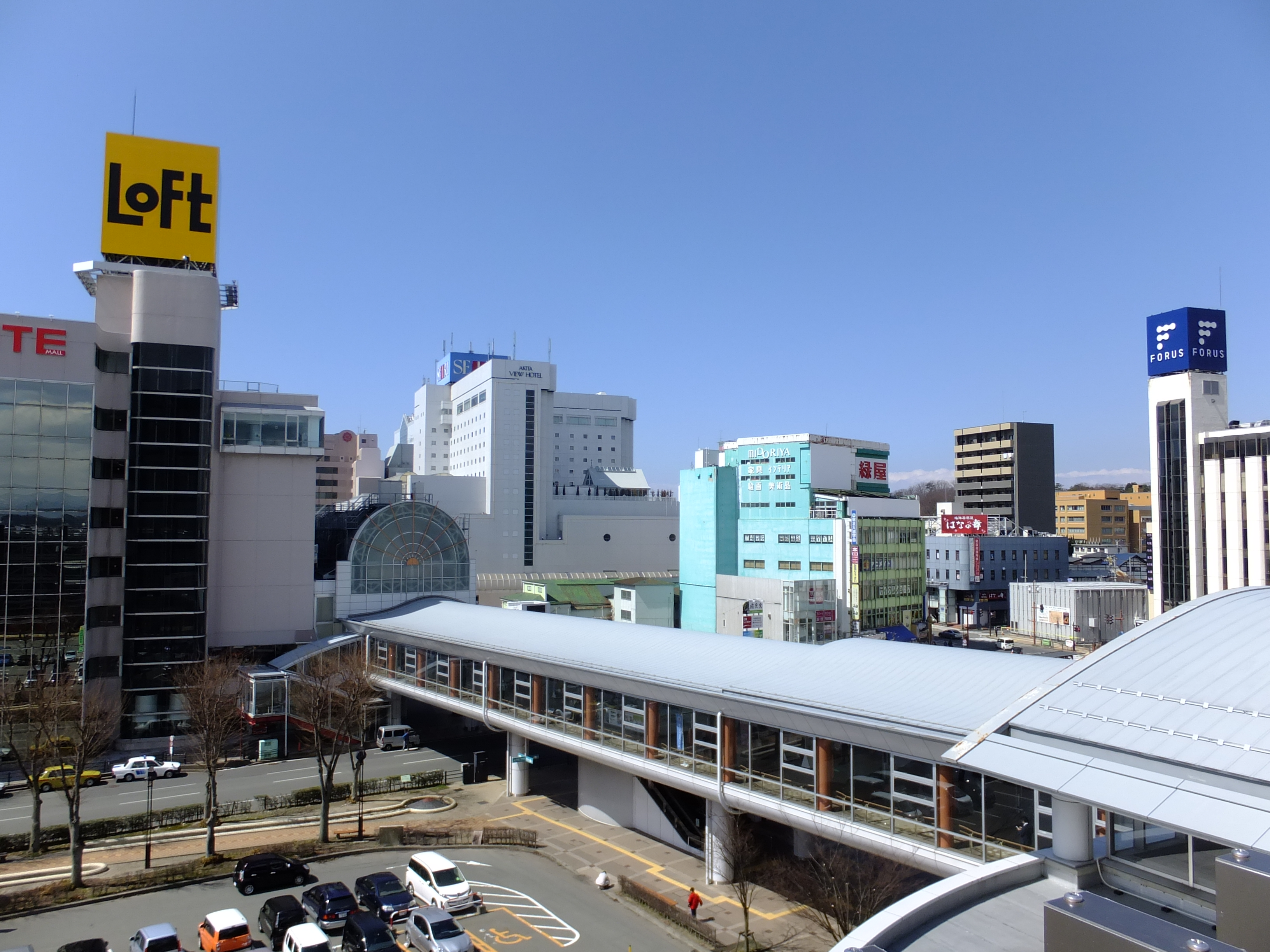 新装なった秋田駅西口立体駐車場から見た秋田駅前の眺め。画面奥のフォンテAKITAに向かって屋根付き自由通路「ぽぽろーど」が伸びる。